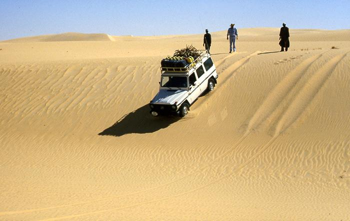 "Sturzflug" des Geländewagens in dem endlosen Dünenmeer des Grand Erg du Bilma.